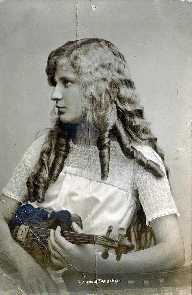 Цецилия Ганзен. Дореволюционная коллекционная открытка